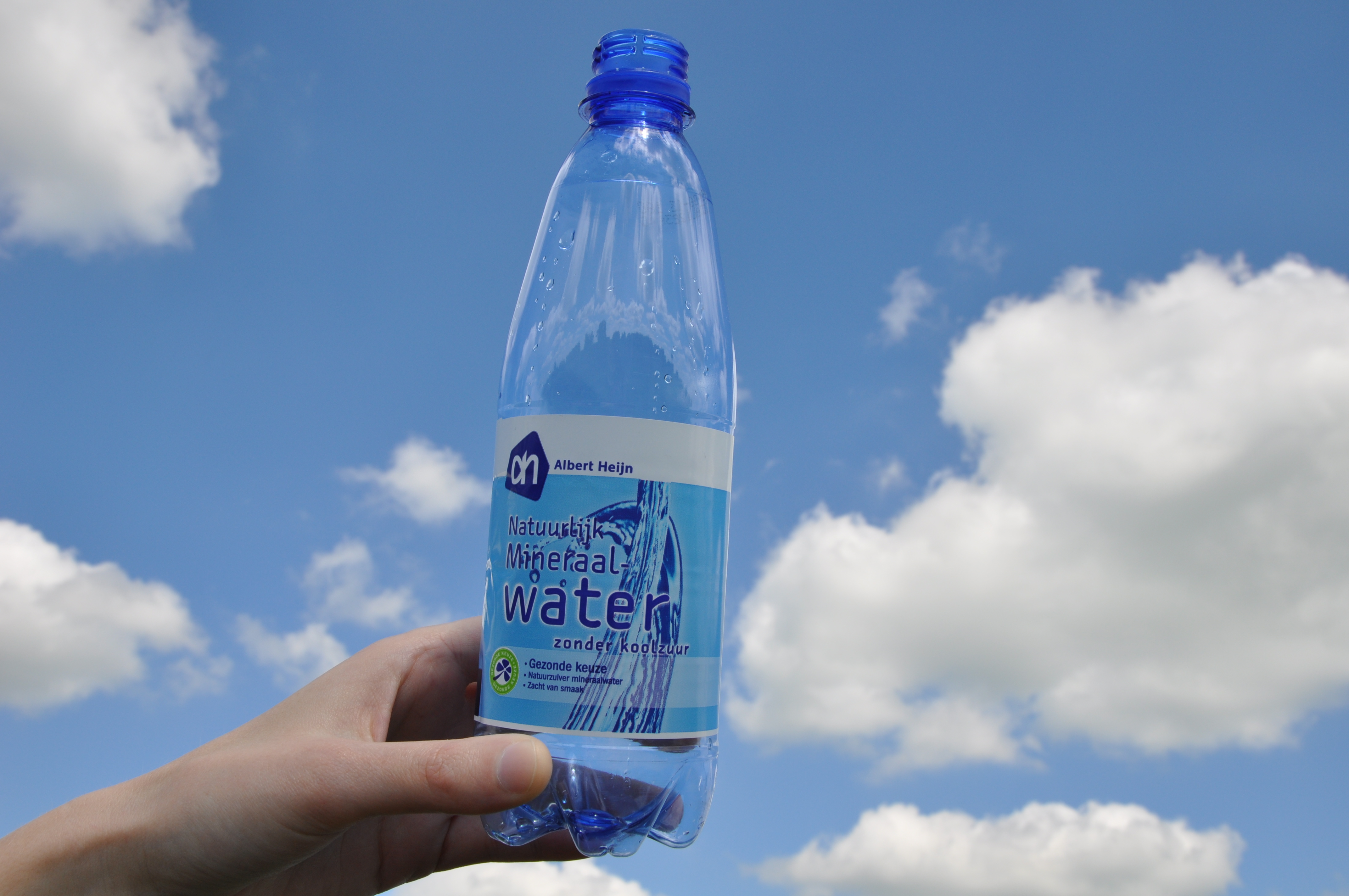 Een flesje mineraalwater van Albert Heijn.